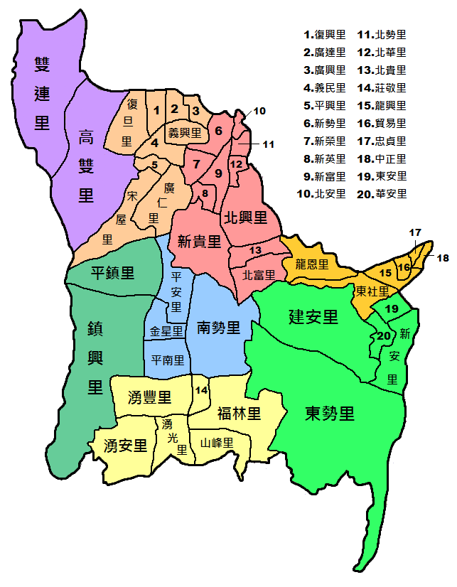 桃園縣平鎮市行政區圖 (各里邊界可能不準確，僅作為示意圖用)